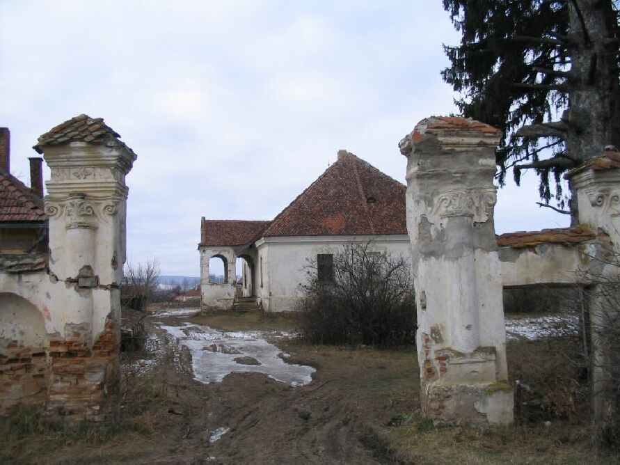 Horváth kúria, Orbaitelek, 2006